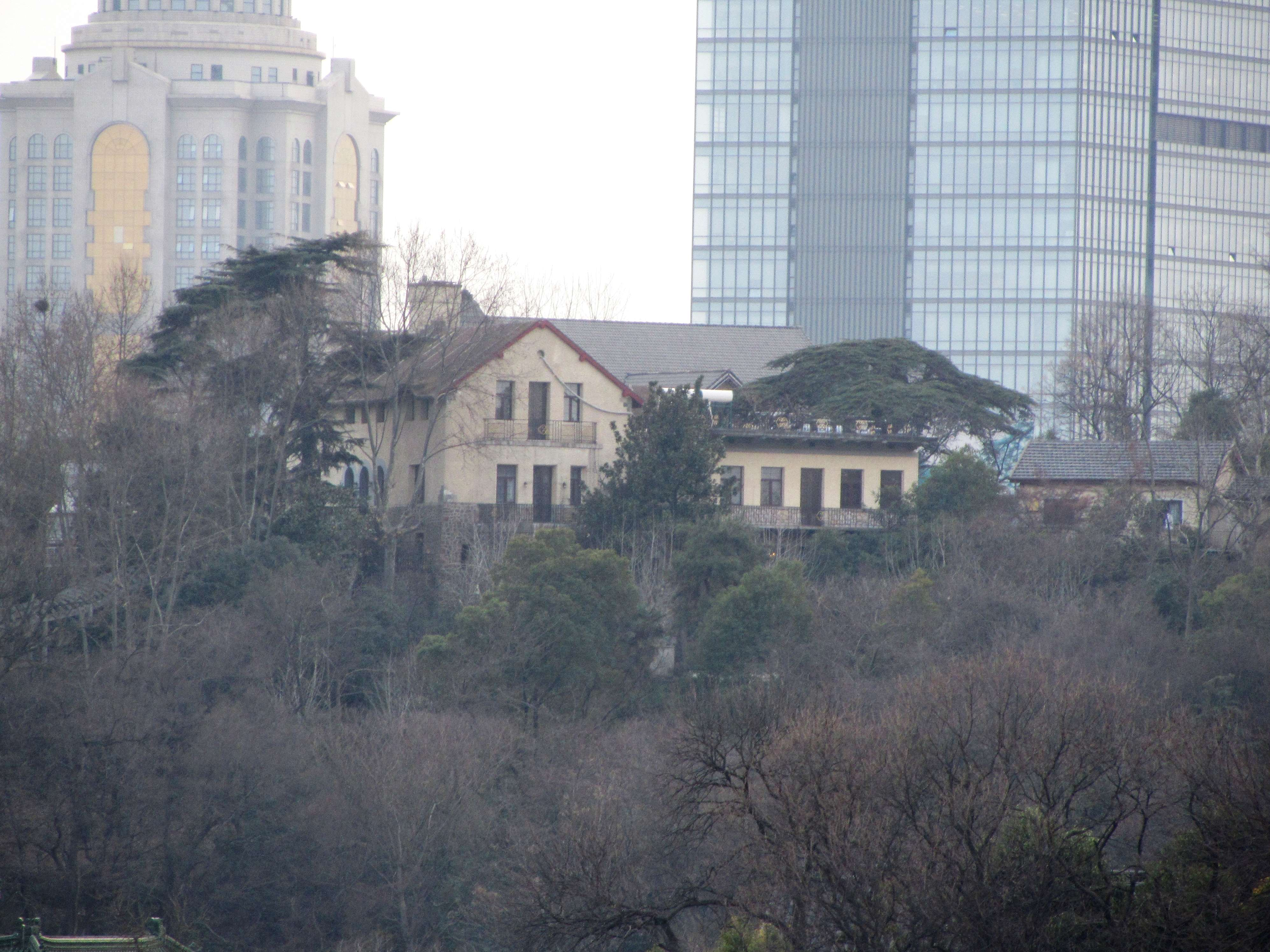 南京北极阁宋子文公馆旧址。